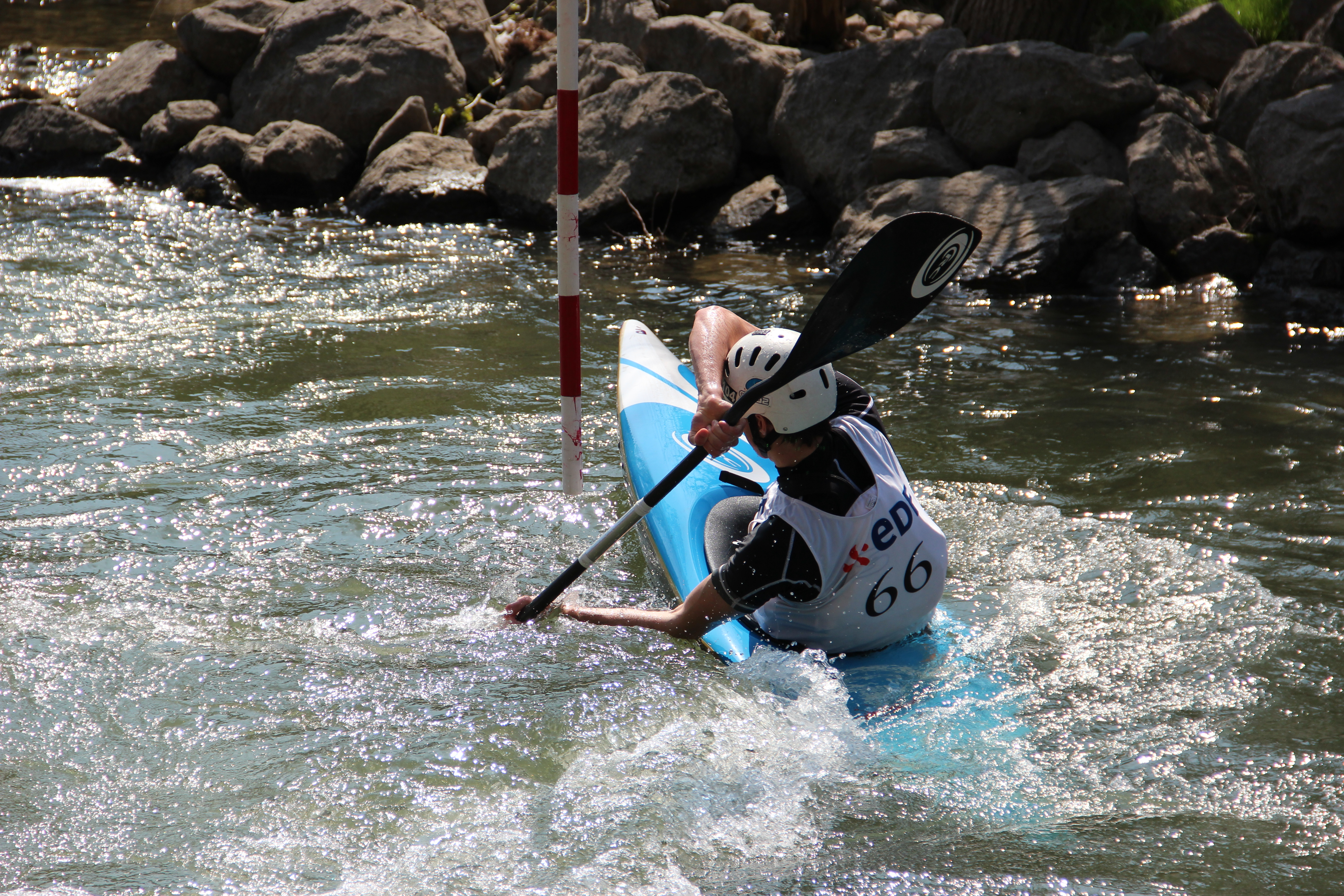 Slalom des Capitouls : Compétition de Nationale 2 de Canoë-Kayak. Île du Ramier, Toulouse.